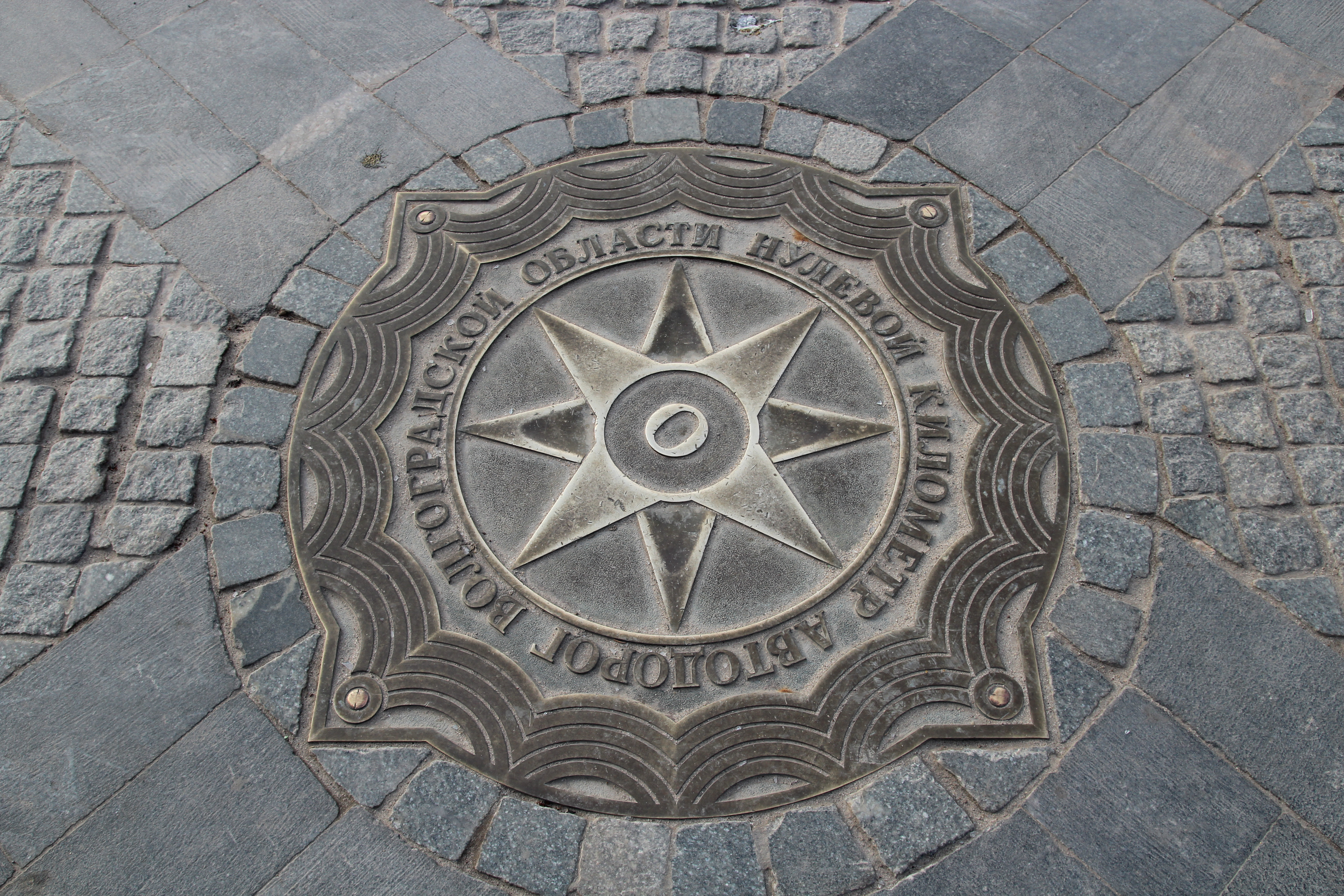 Нулевой километр автодорог Волгоградской области